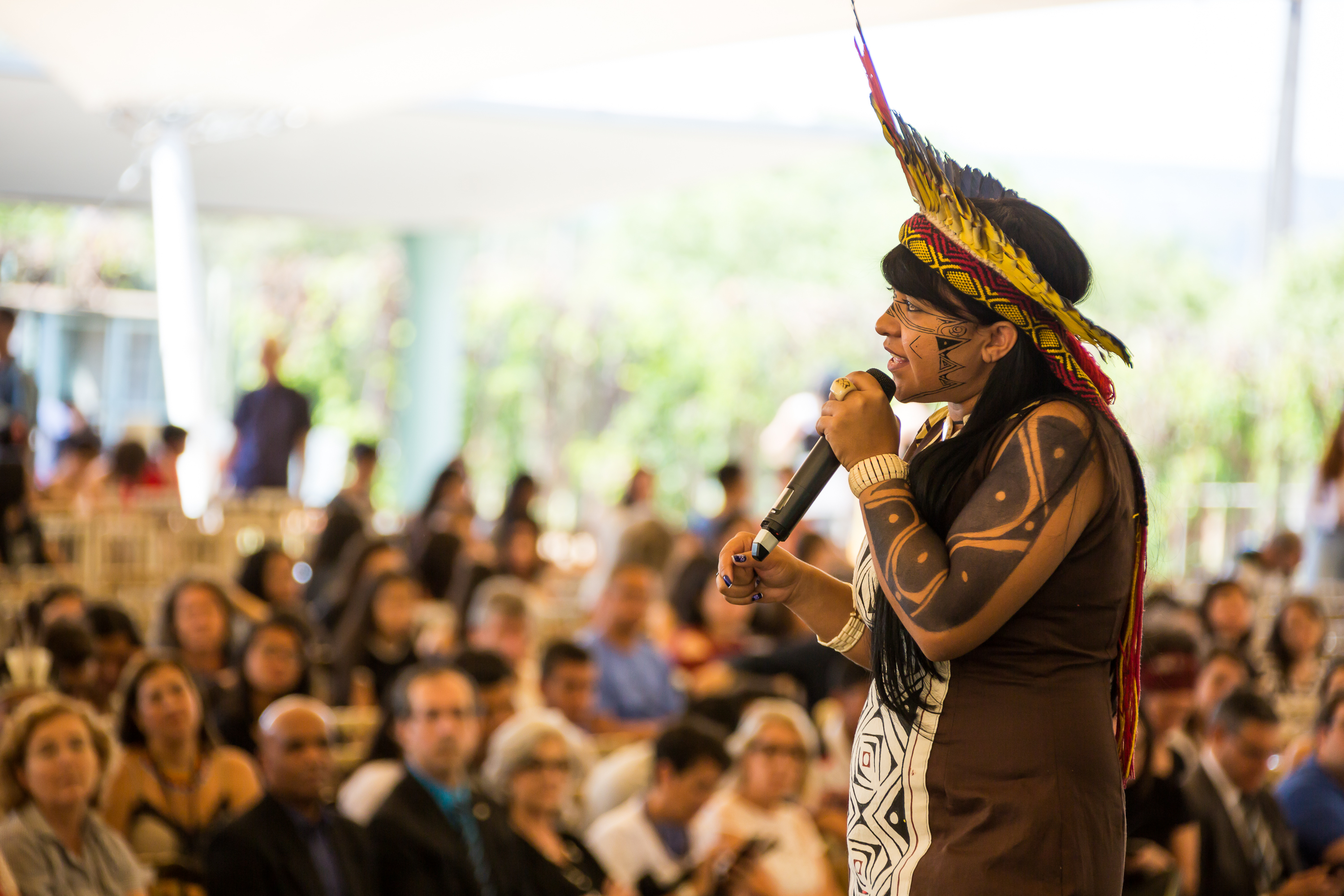 InspiraUnB, cerimônia de boas-vindas aos calouros do 2º semestre de 2018, com a participação da líder indígena Célia Xakriabá. Foto:Raquel Aviani / Secom UnB. ATENÇÃO – As informações, as fotos e os textos podem ser usados e reproduzidos, desde que a fonte seja devidamente citada e que não haja alteração de sentido em seus conteúdos. Crédito para fotos: nome do fotógrafo/Secom UnB